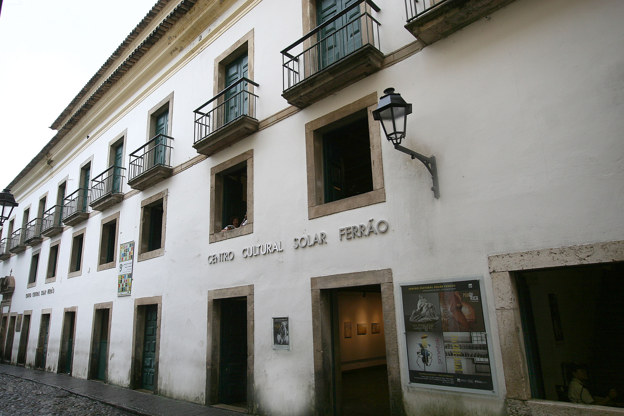 Centro cultural Solar Ferrão,localizado na praça Municipal, no Centro Antigo de Salvador (CAS), foi um dos locais escolhidos para visitação Foto: Ronaldo Silva/Secom